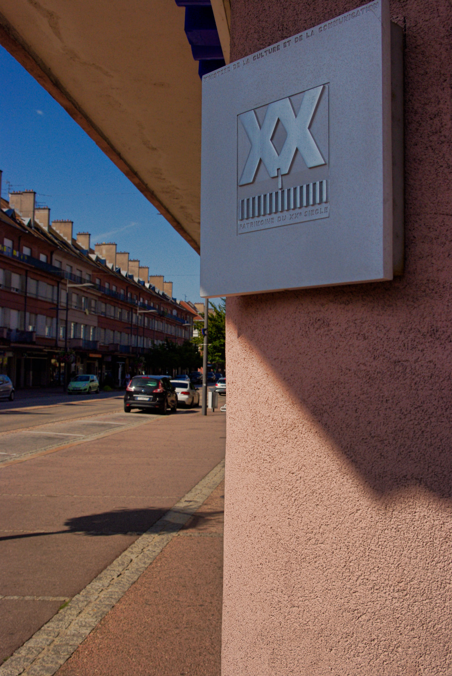 Panonceau confirmant la labellisation du cœur de ville "Patrimoine du XXe siècle" de la ville de Saint-Dié-des-Vosges au titre de l'importance et de l’homogénéité de son urbanisme résultant de sa reconstruction courant des "années 50". La rue Thiers, visible en arrière plan, est emblématique du quadrillage urbain hippodaméen du cœur de ville.